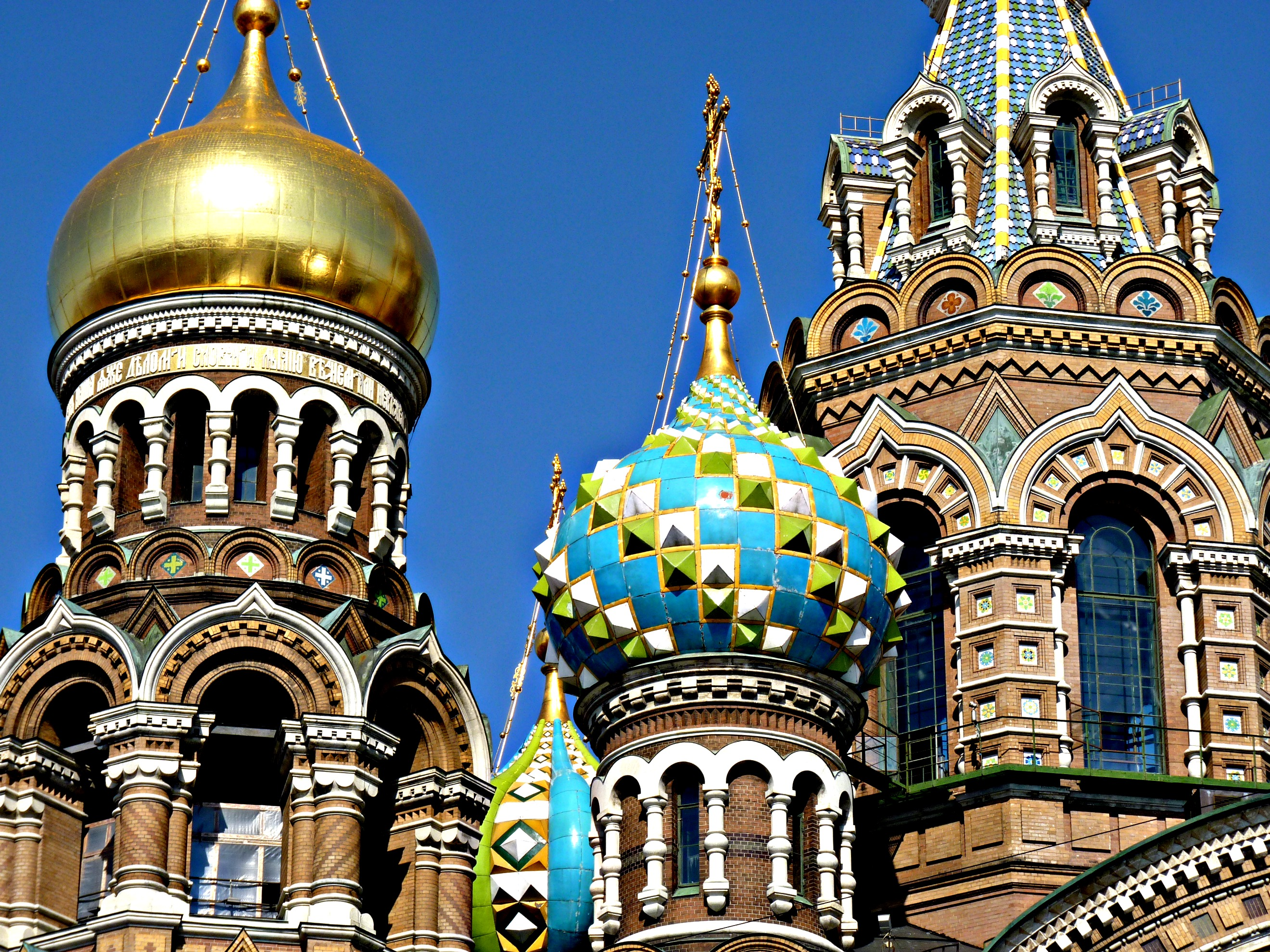 Фото сделано также в августе 2011 во время экскурсии по рекам и каналам города. Вид на купола с канала Грибоедова, между Итальянским и Тройным мостами.